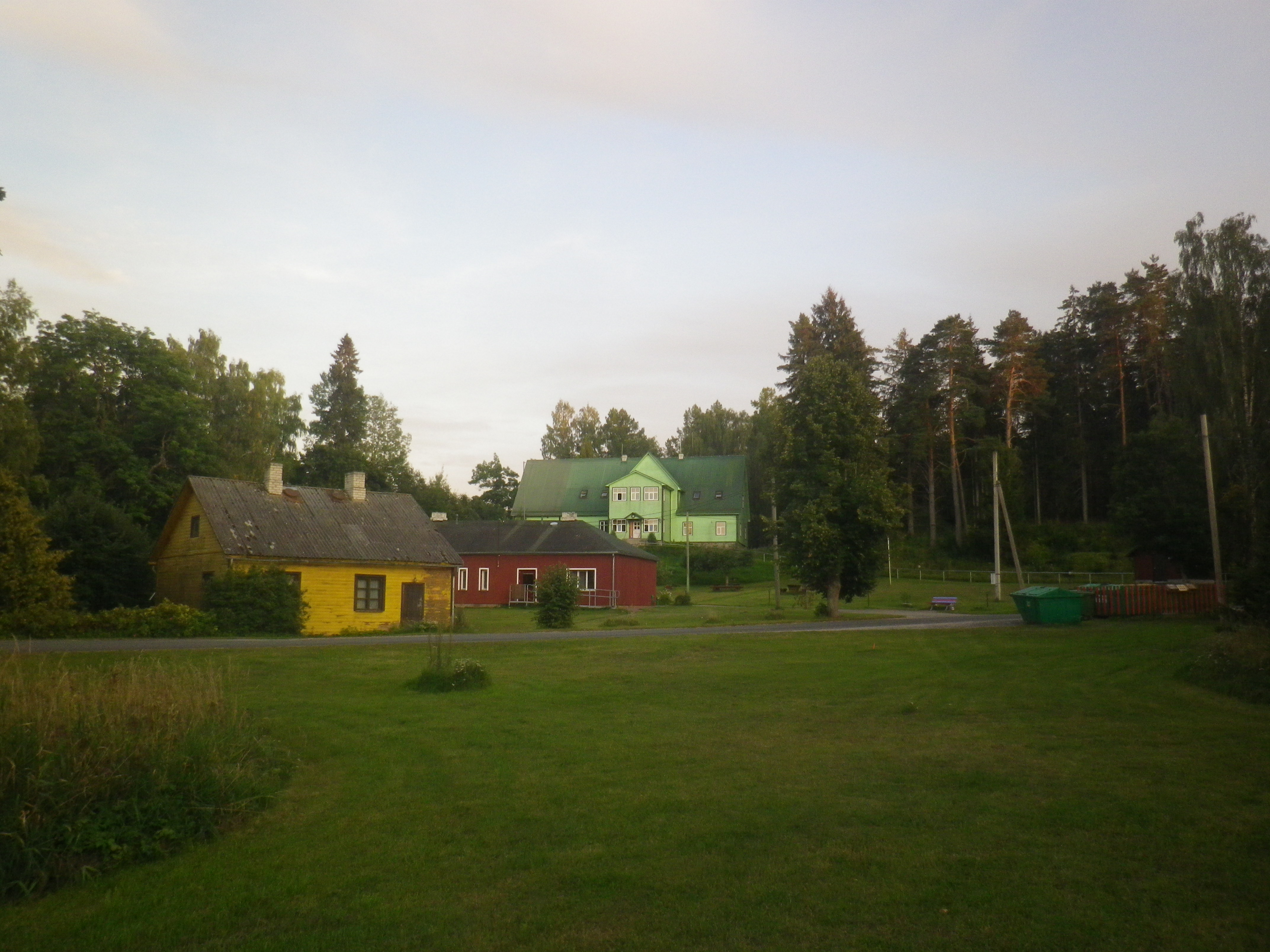 Aarike Hooldekeskuse kompleksi hooned, augustis 2019.